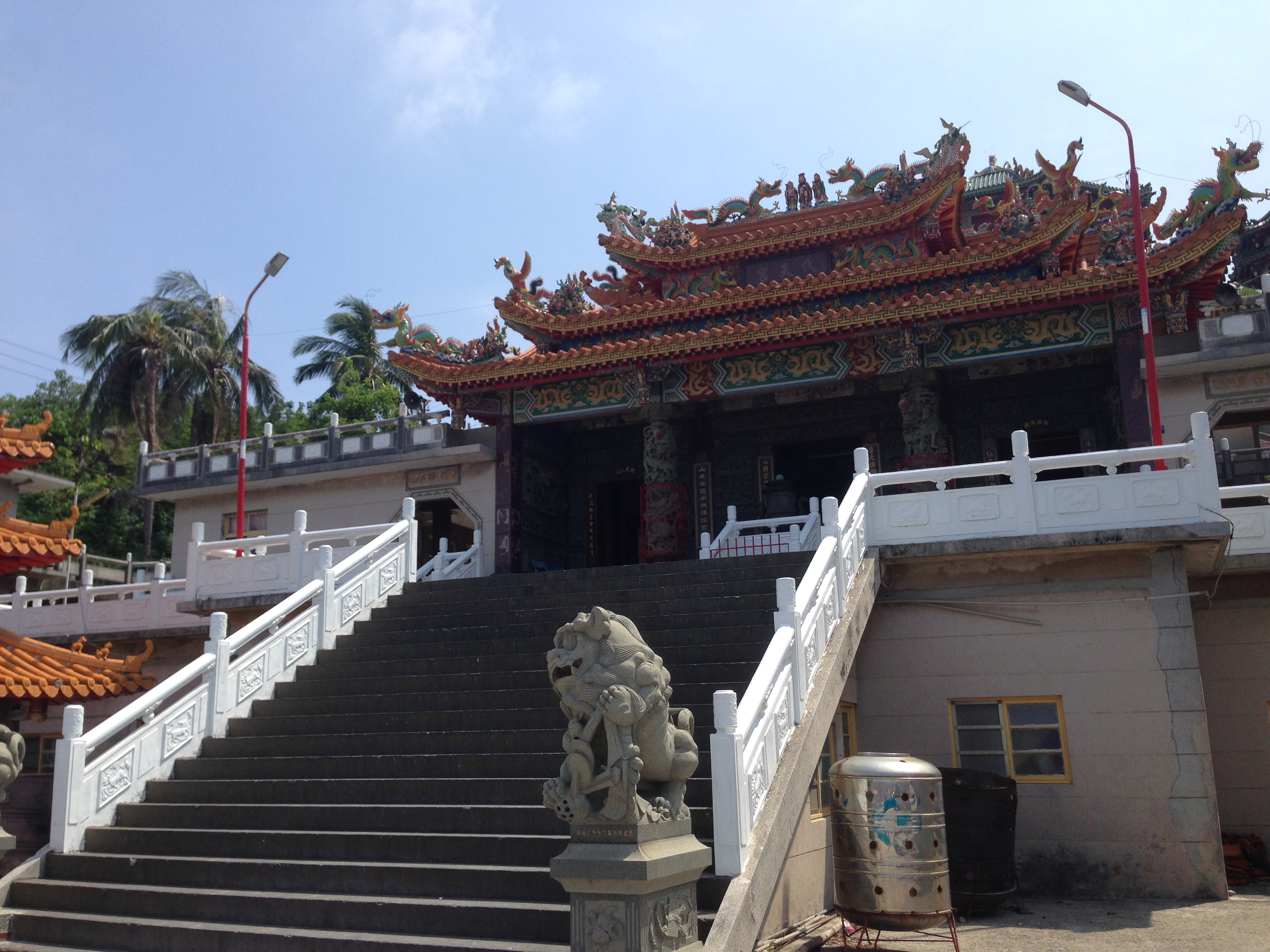 中文（台灣）: 小琉球靈山寺